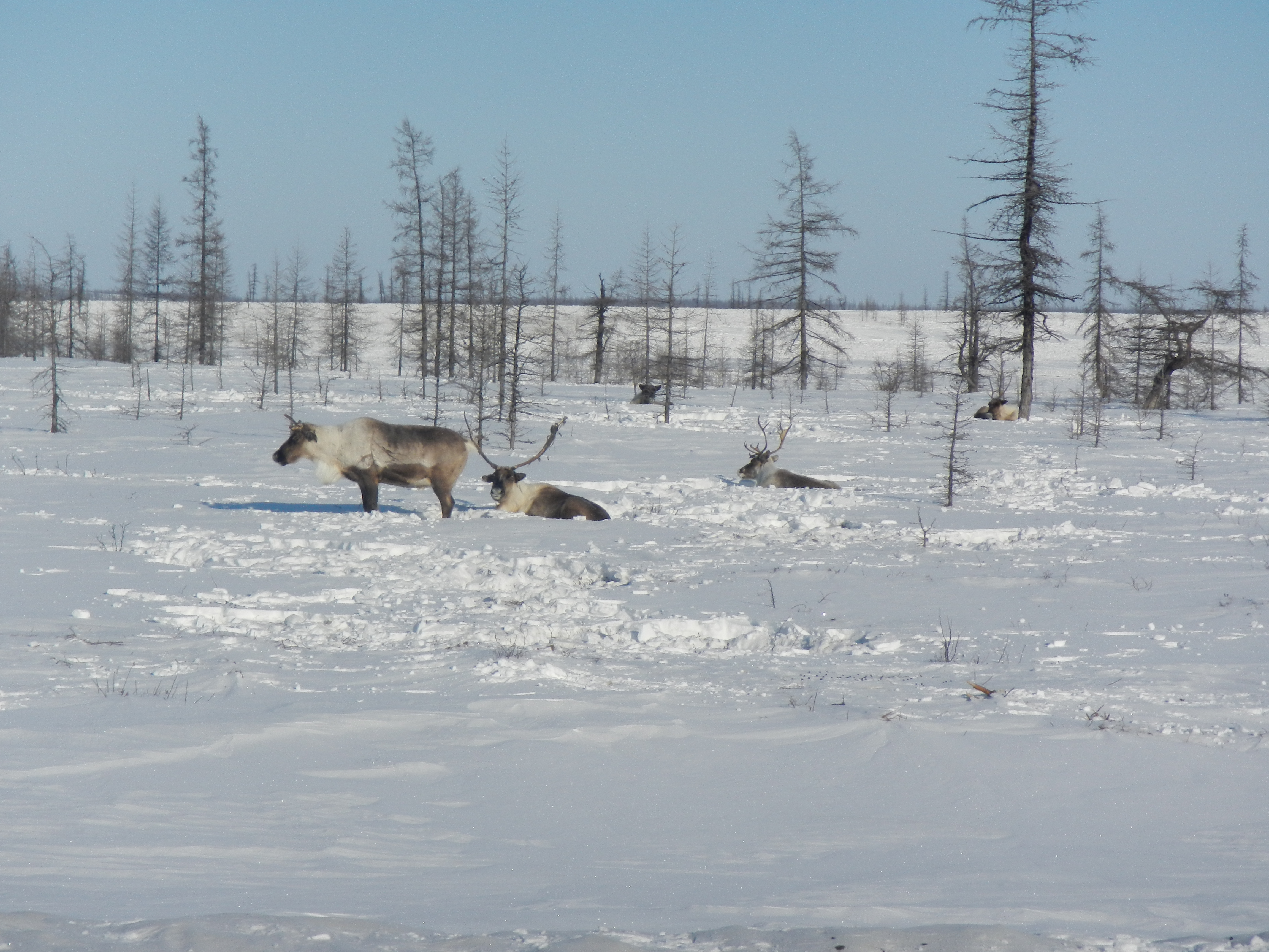 Тыдды-Оттинский заказник: Пуровский район, This image is related to the protected area of Russia number 8910013